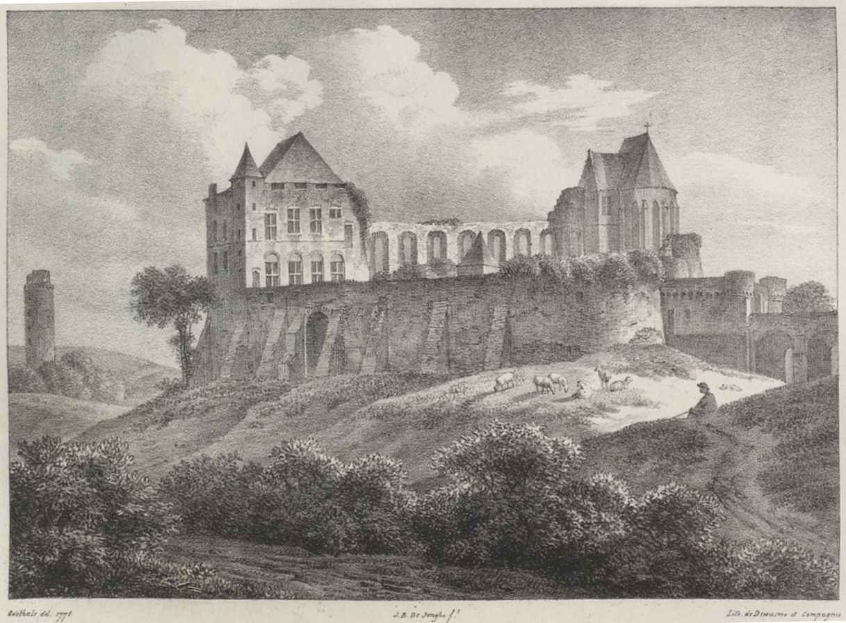 Keizersberg, Leuven. Steendruk van Jean-Baptiste de Jonghe naar een tekening van Jacques Goethals uit 1778.